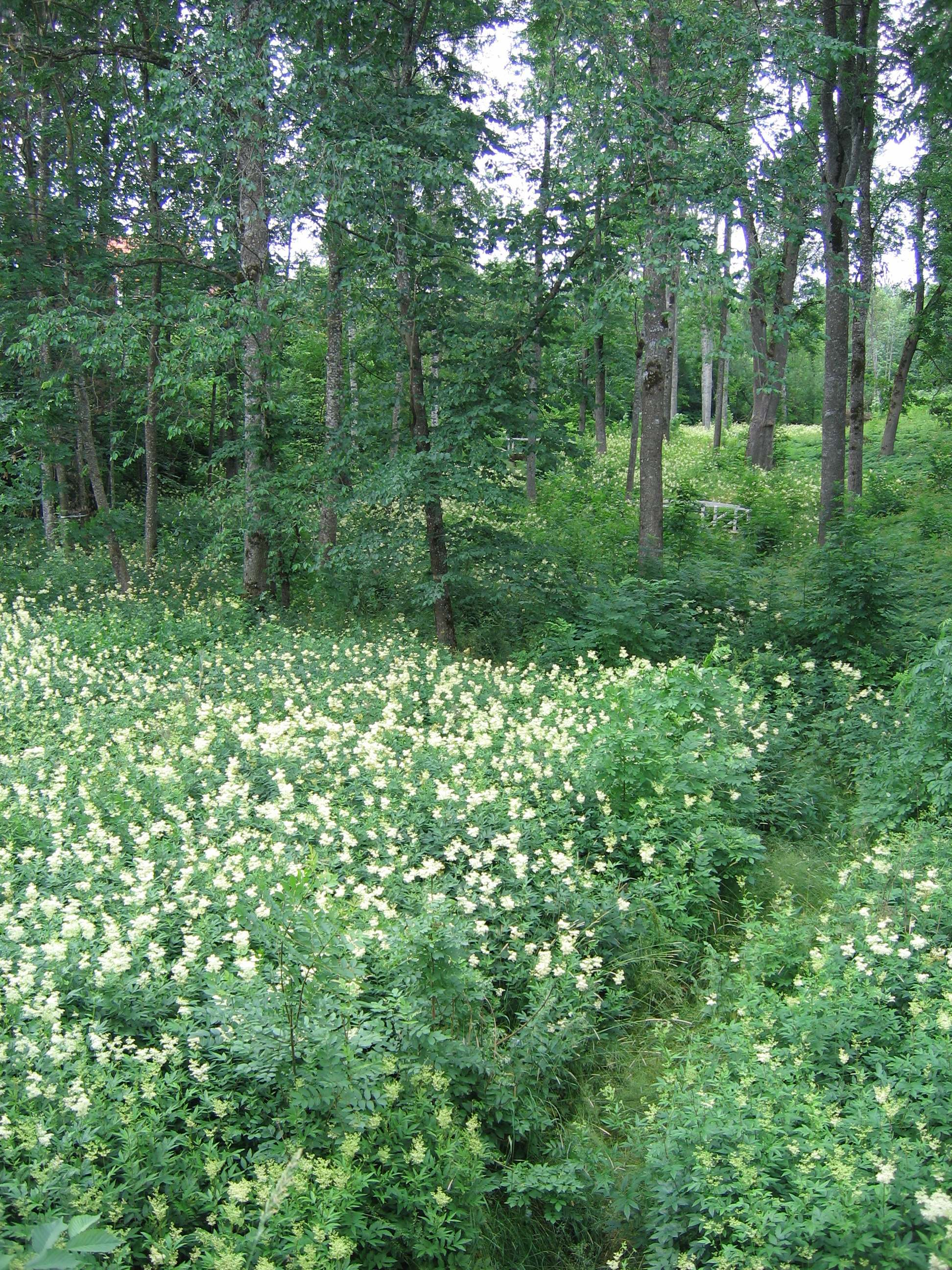 Uppland, Sweden